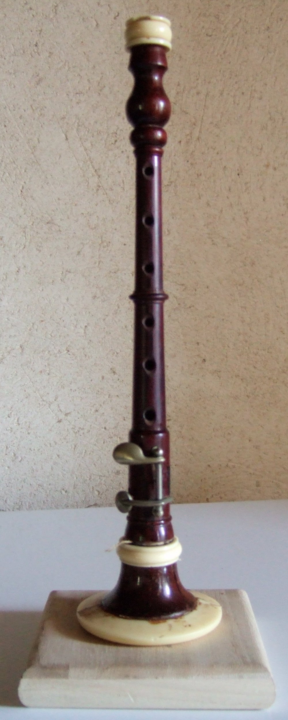 Bombarde en si bémol à 6 trous et clefs, en bois exotique, de gamme tempérée. Date des années 60.